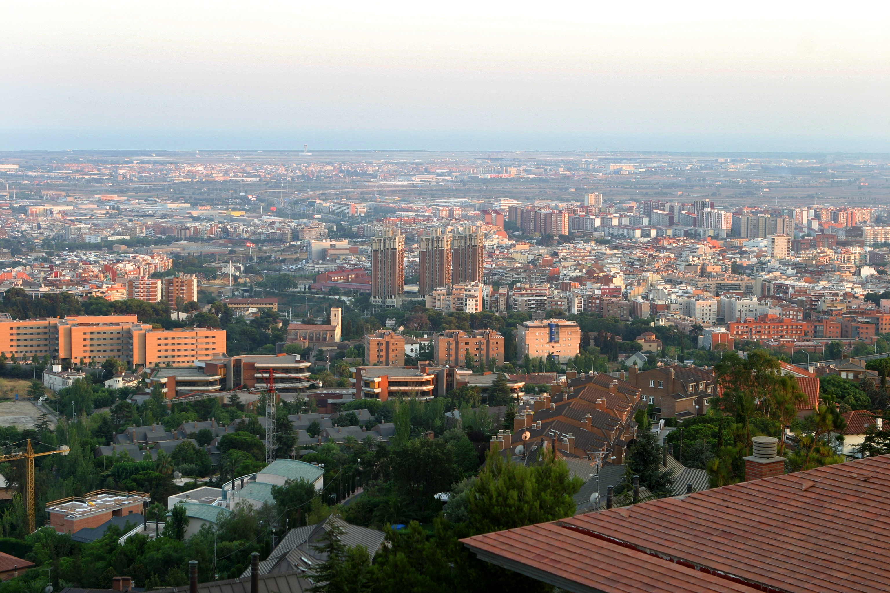 Vistes d'Esplugues